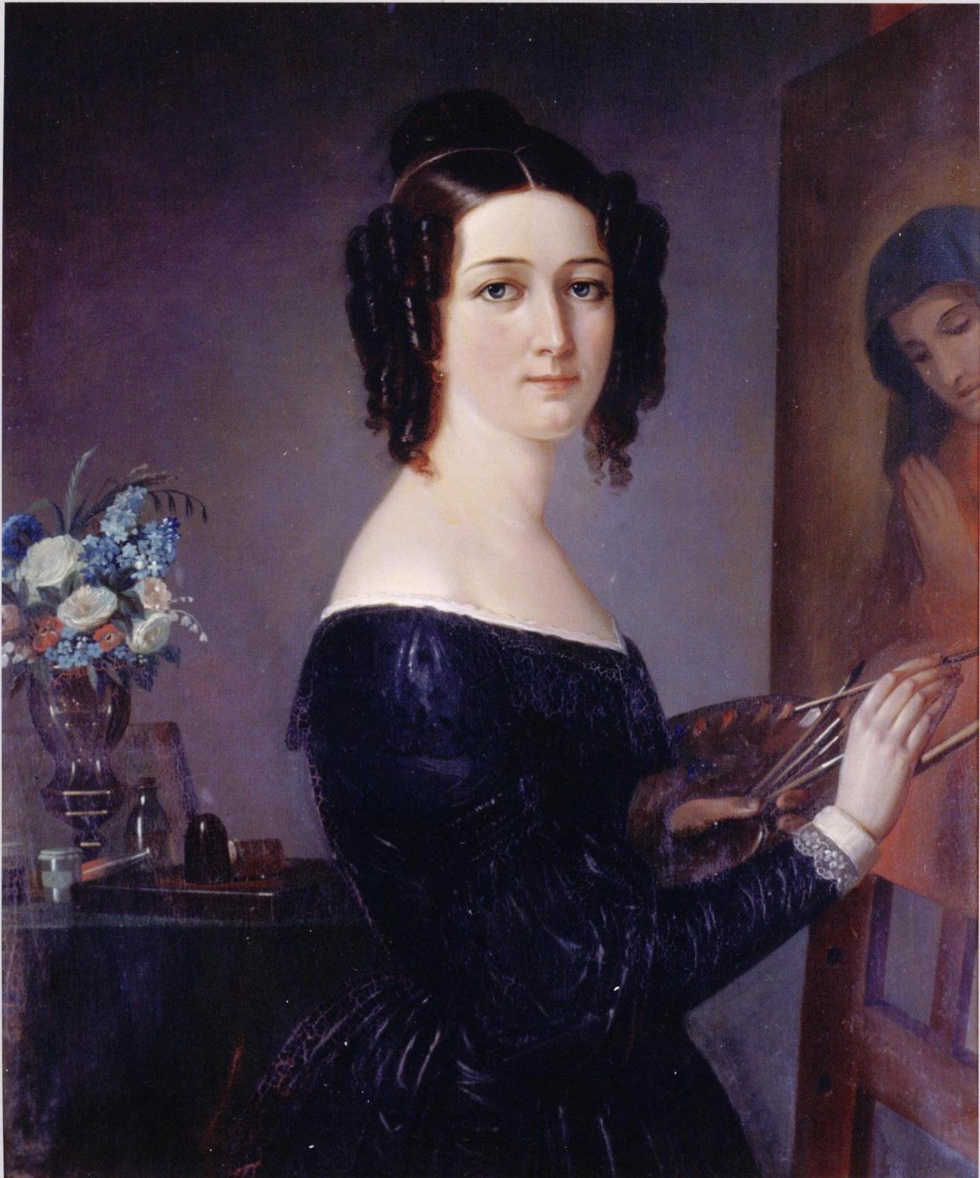 Taidemaalari Mathilda Rotkirch (1813–1842) opettajansa Robert Wilhelm Ekmanin maalamassa postuumissa muotokuvassa. Omistaja Svenska Litteratursällskapet i Finland